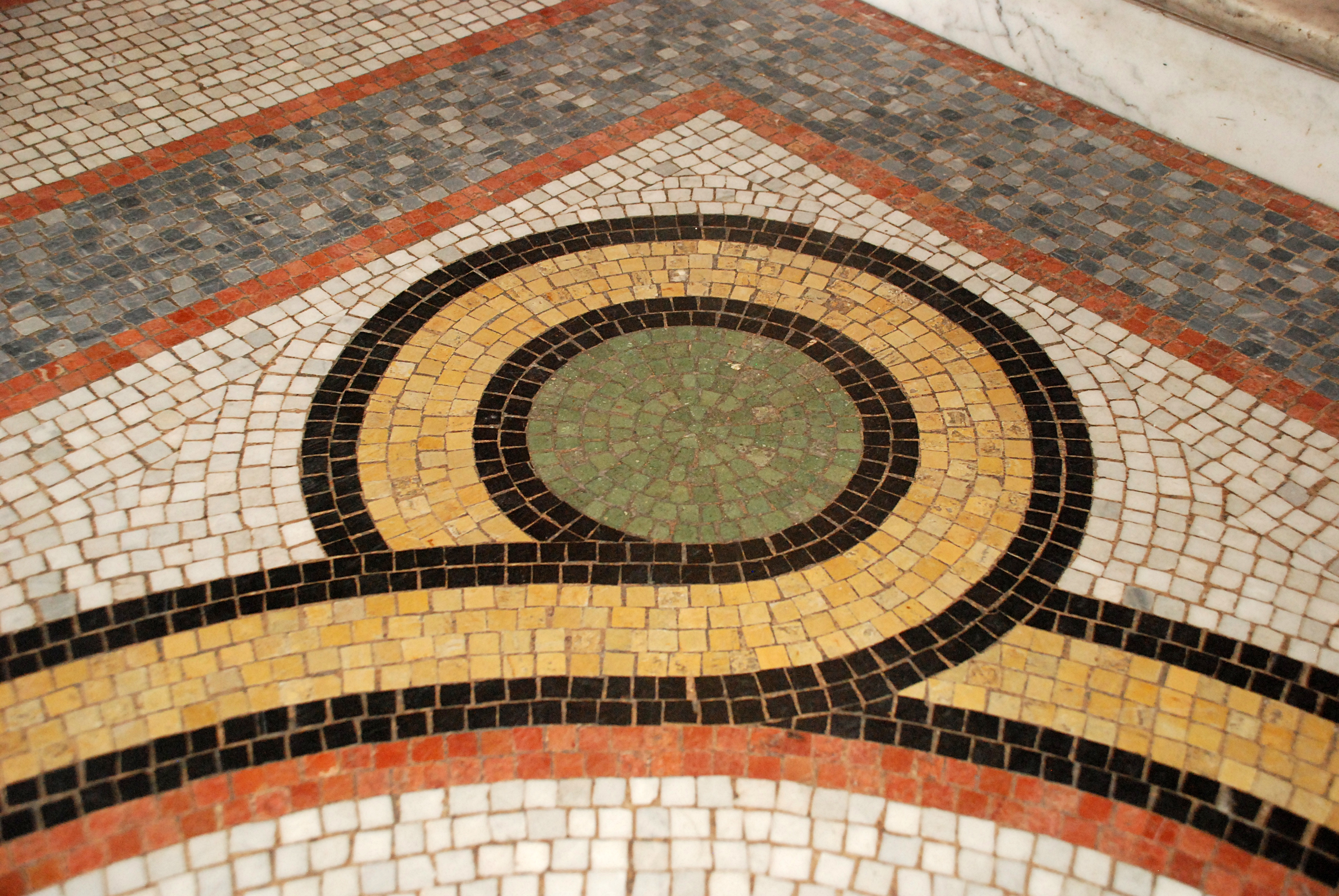 Belgique - Bruxelles - Bibliothèque Solvay